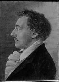 Radierung von seiner Schwester Florentine Hagen, verh. Neumann